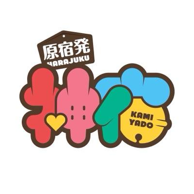 神宿のロゴです。